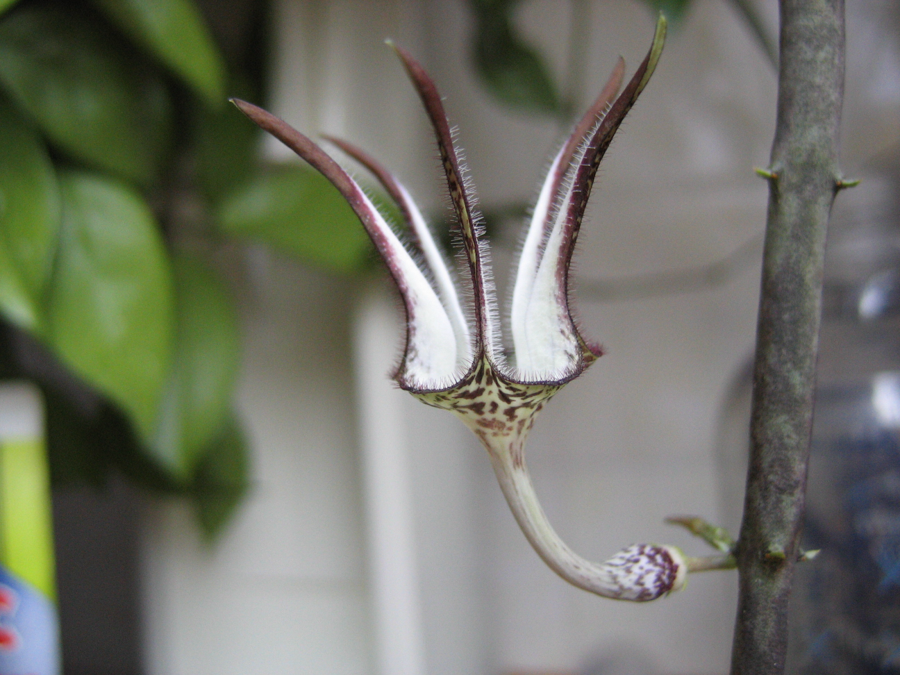 Ceropegia stapeliaeformis